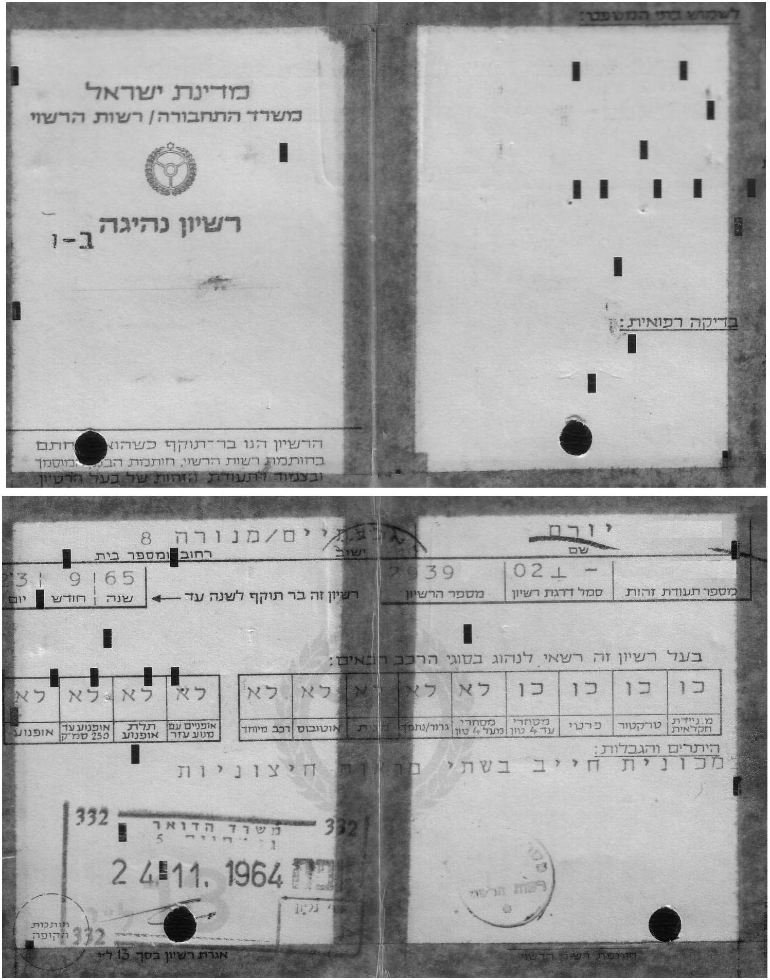 רשיון נהיגה ראשון מופק במחשב, מודפס על גבי כרטיסי ניקוב